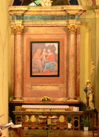 Altare della cappella di Sant'Anna nella chiesa prepositurale di San Vittore martire di Corbetta (MI) - Italy